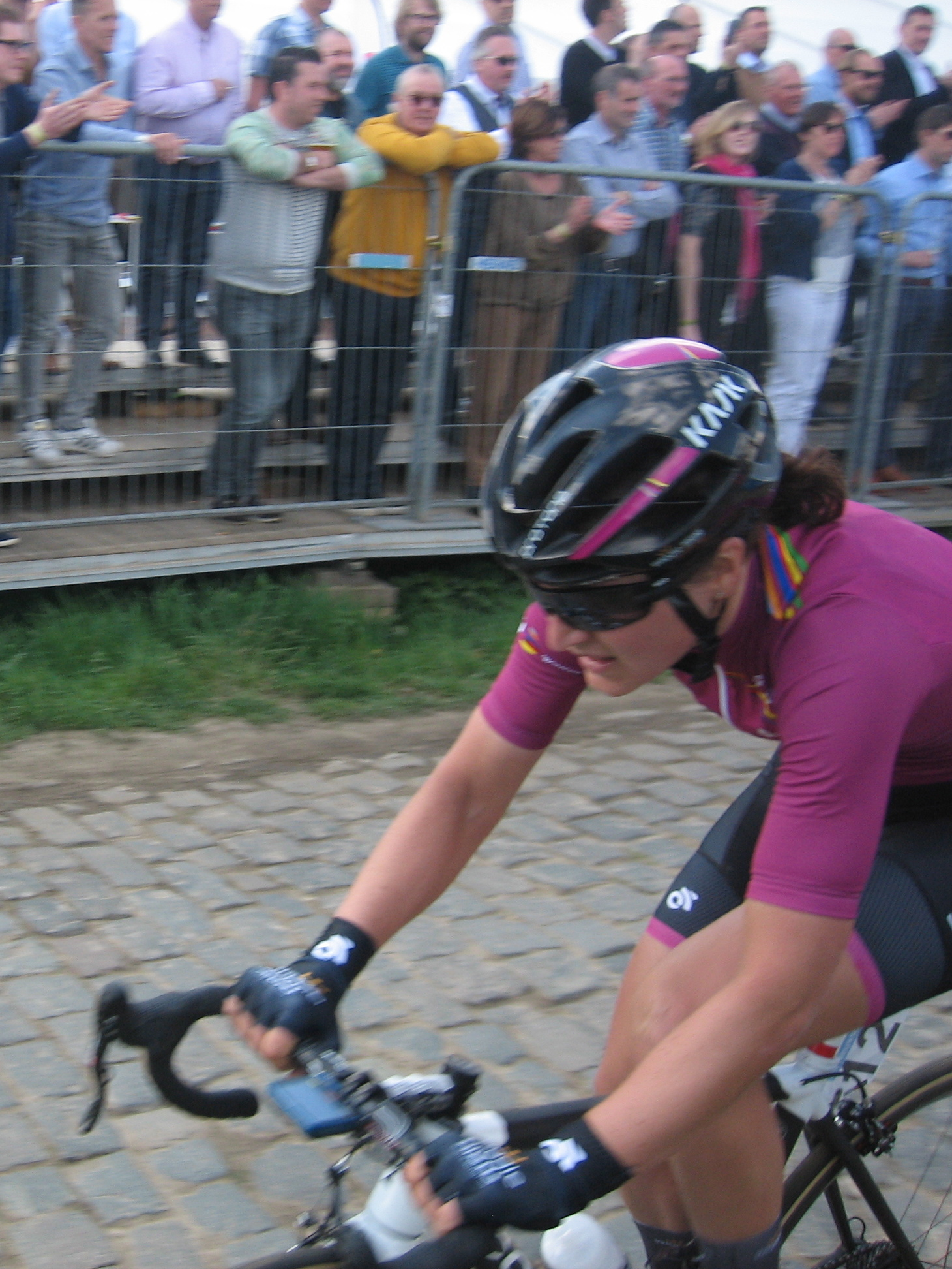 Elisa Longo Borghini (leidster in de Women's World Tour) aan de leiding op de Oude Kwaremont in de Ronde van Vlaanderen voor vrouwen 2017.